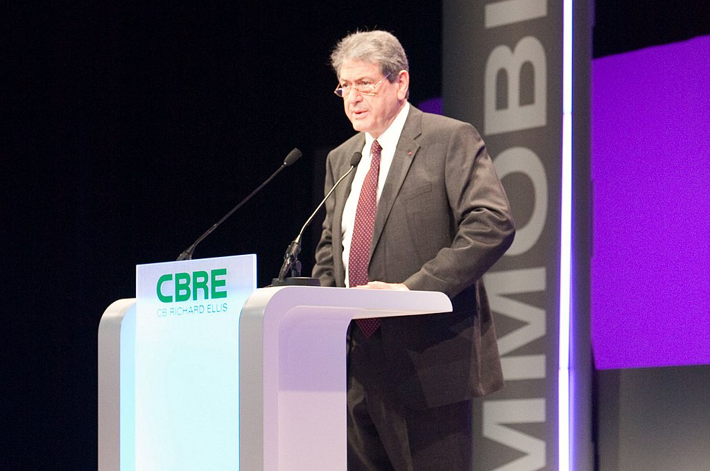 Intervention de Christian Blanc au 35ème Forum CB Richard Ellis